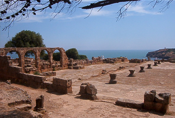 Ruines romaines de Tipaza